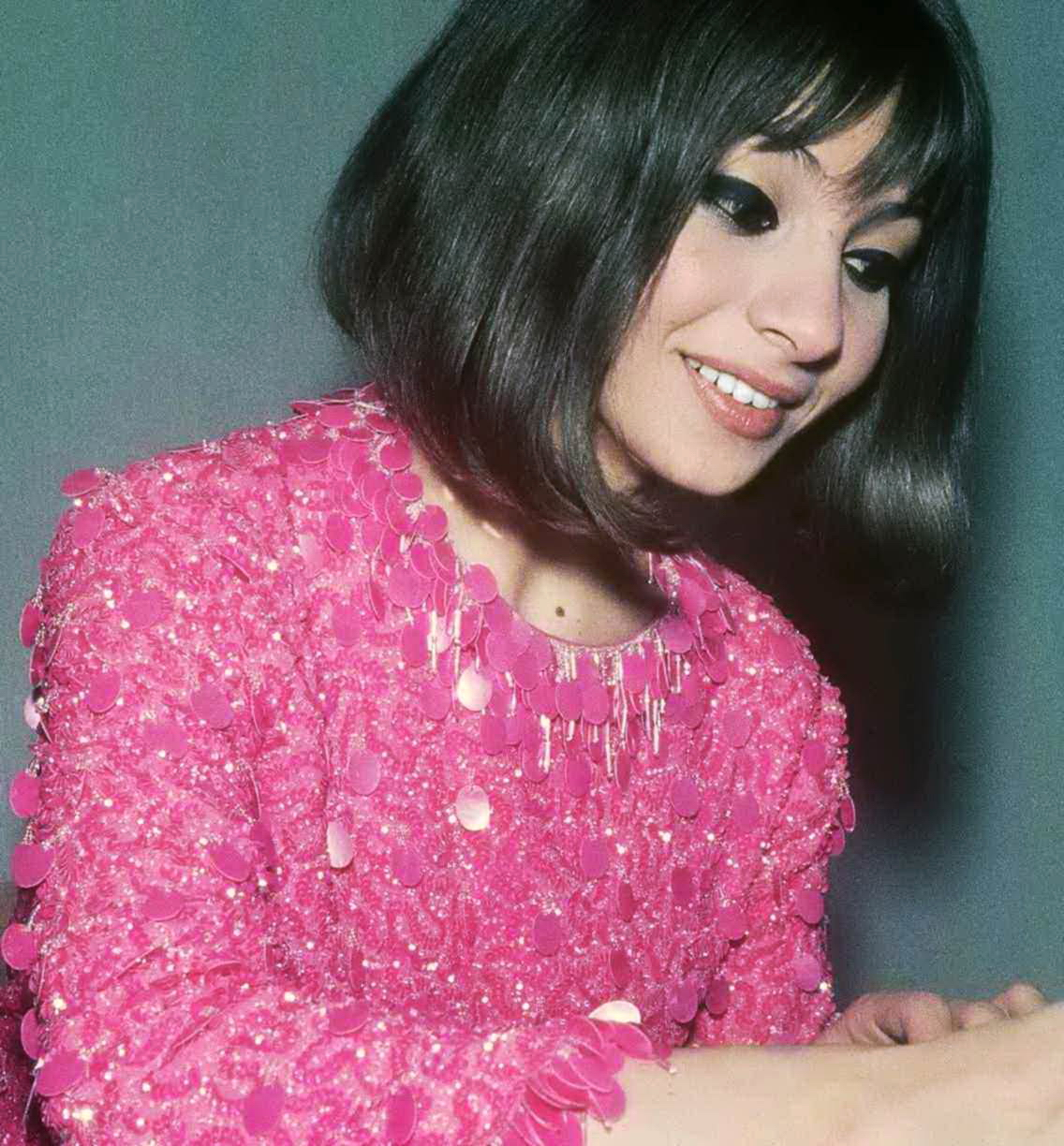 Esther Ofarim 1966 im Backstage-Bereich